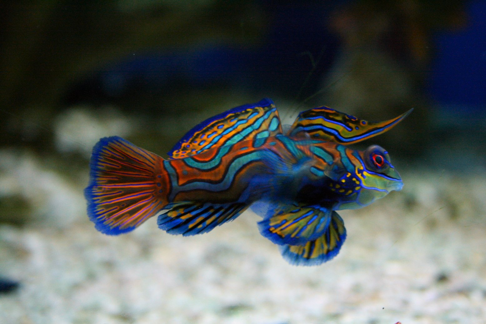 poisson mandarin